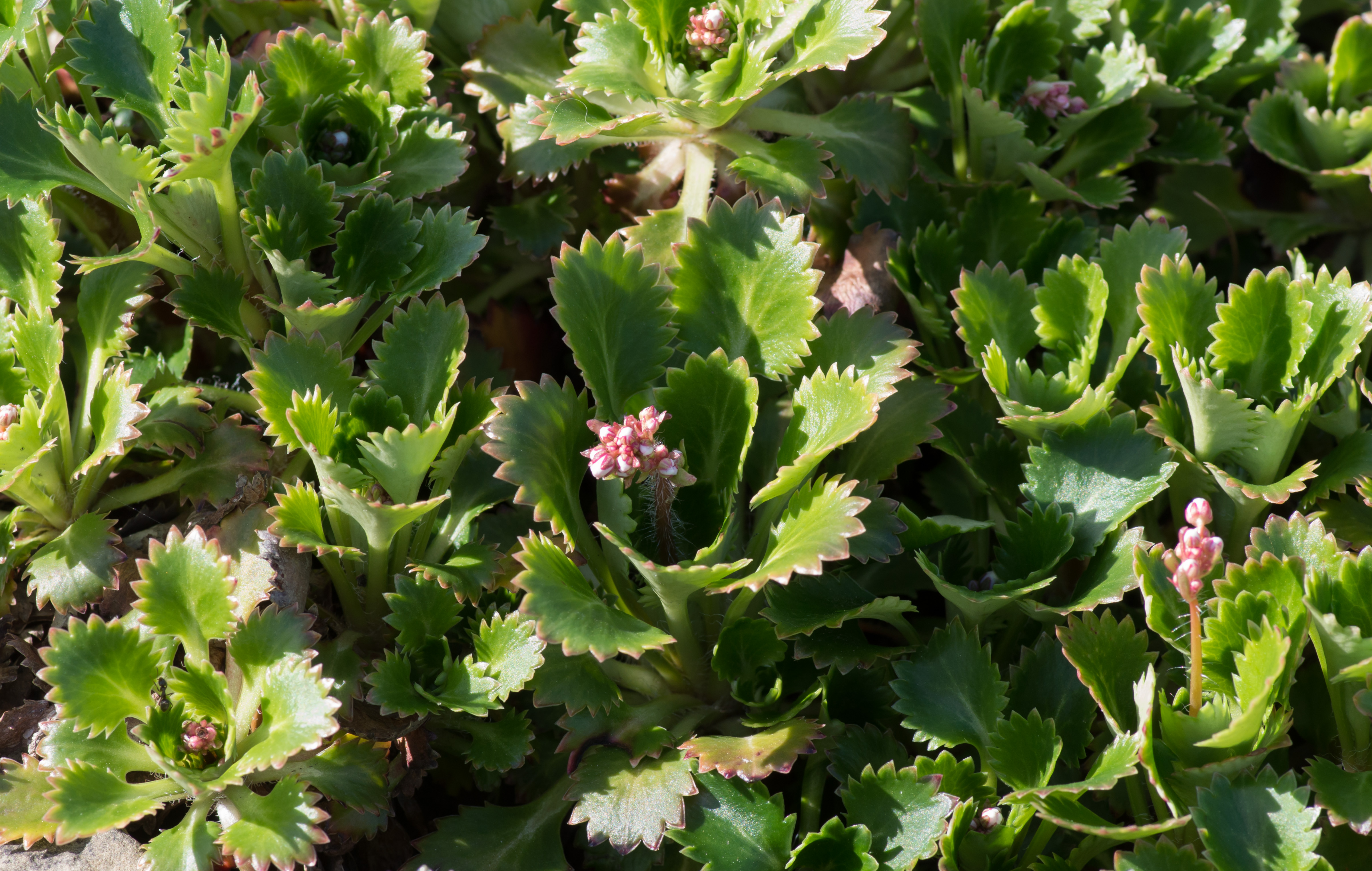 Saxifraga spathularis - Kew Gardens